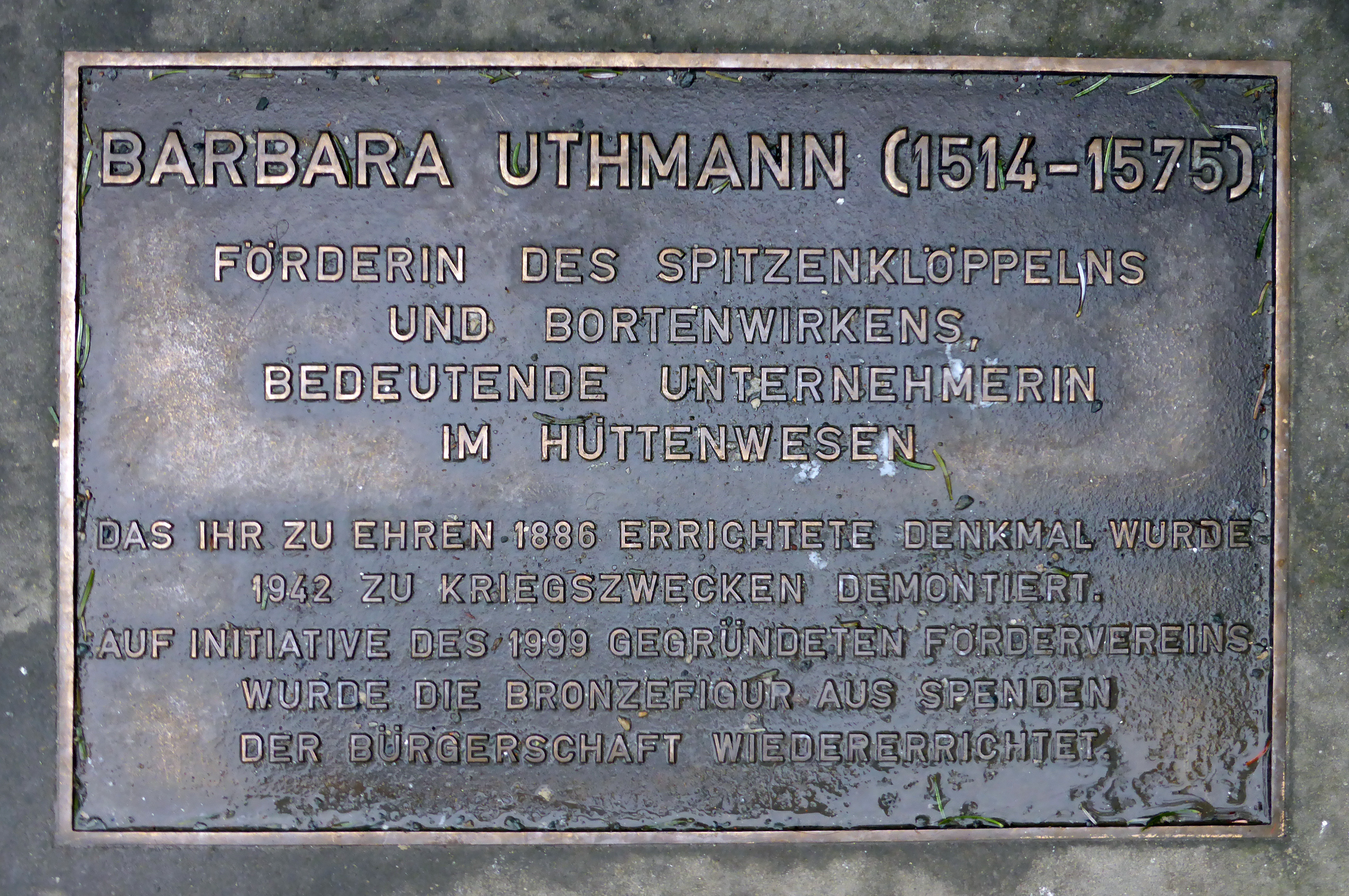 Barbara Uthmann-Brunnen in Annaberg-Buchholz (Statue des Dresdner Bildhauers Robert Henze).